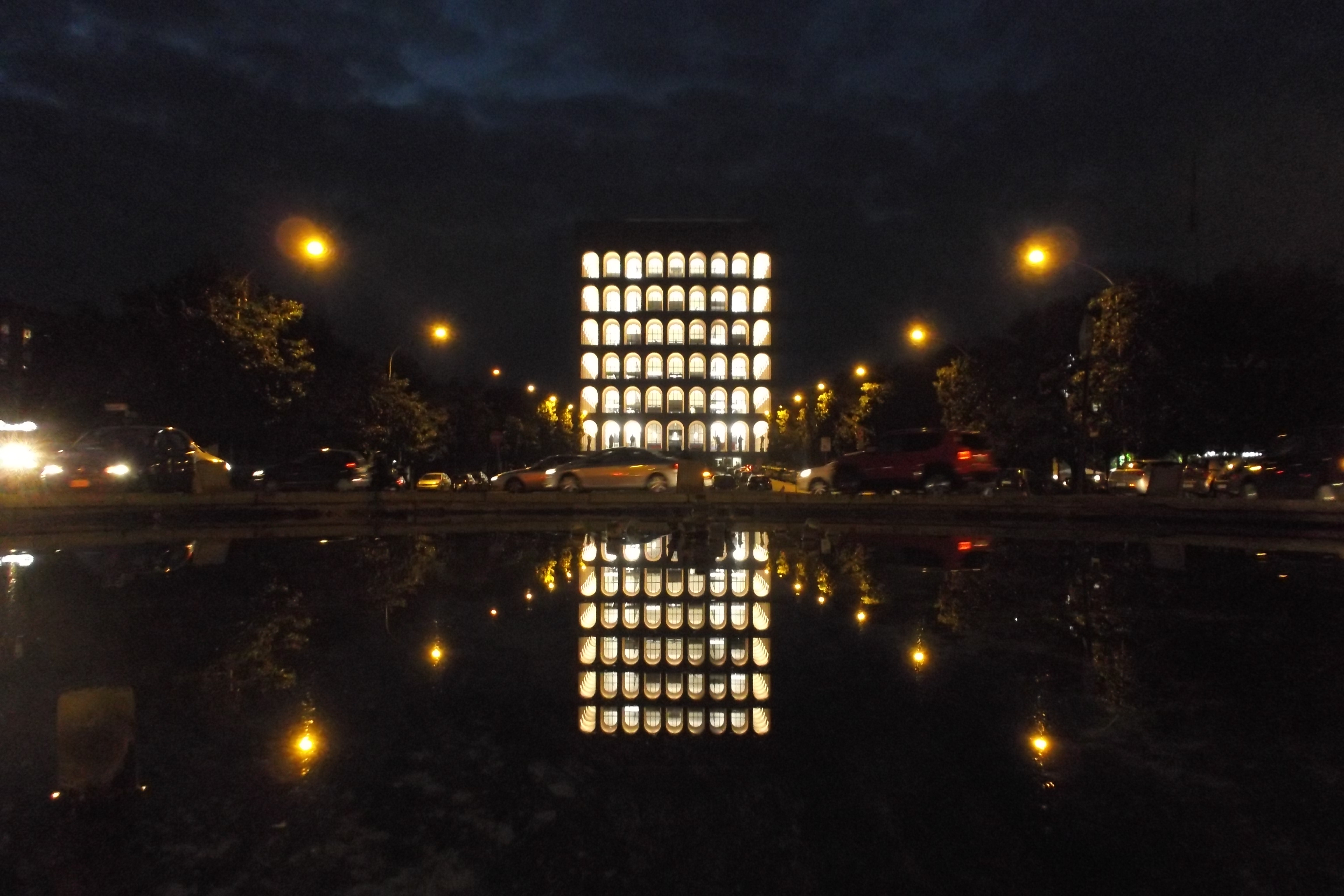 Viale della Civiltà del Lavoro and the Palazzo della Civiltà Italiana by night